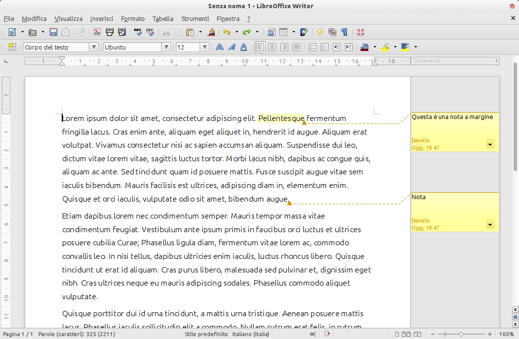 LibreOffice Writer 4.1.0.4 in esecuzione su Ubuntu